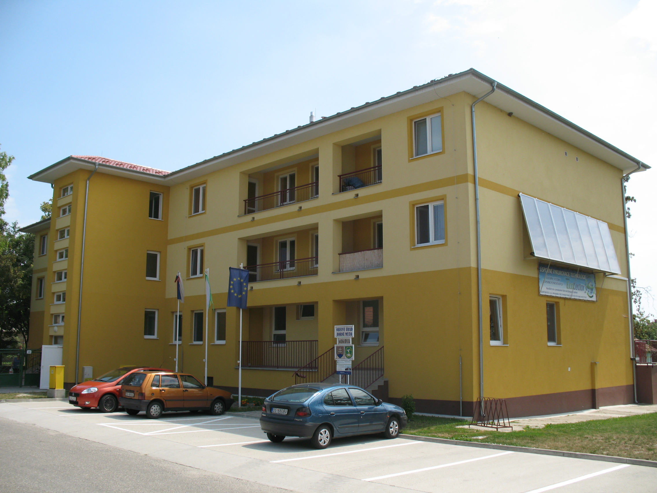 Felsővámos